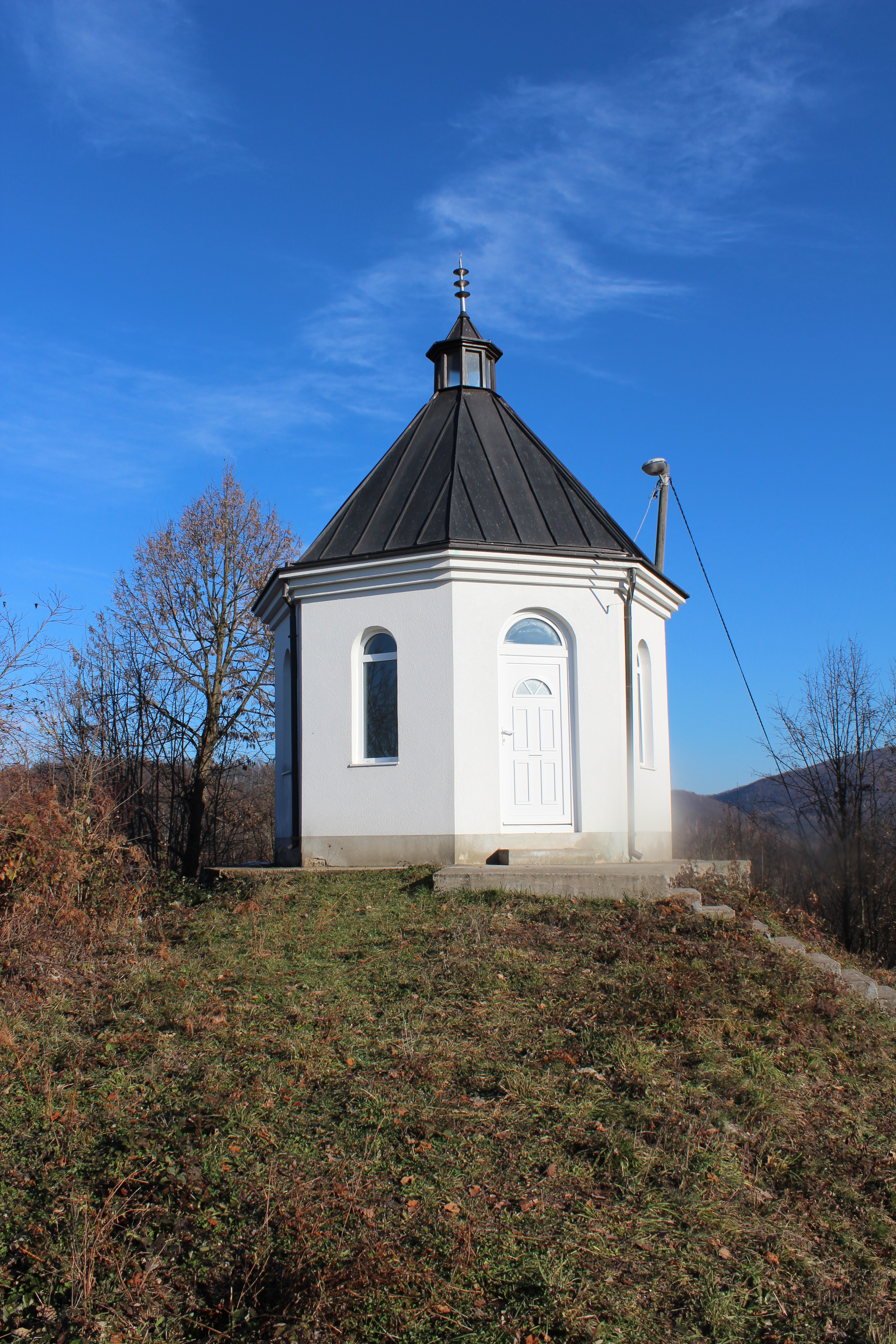 Alijino turbe u Trnovi kod Sanskog Mosta.